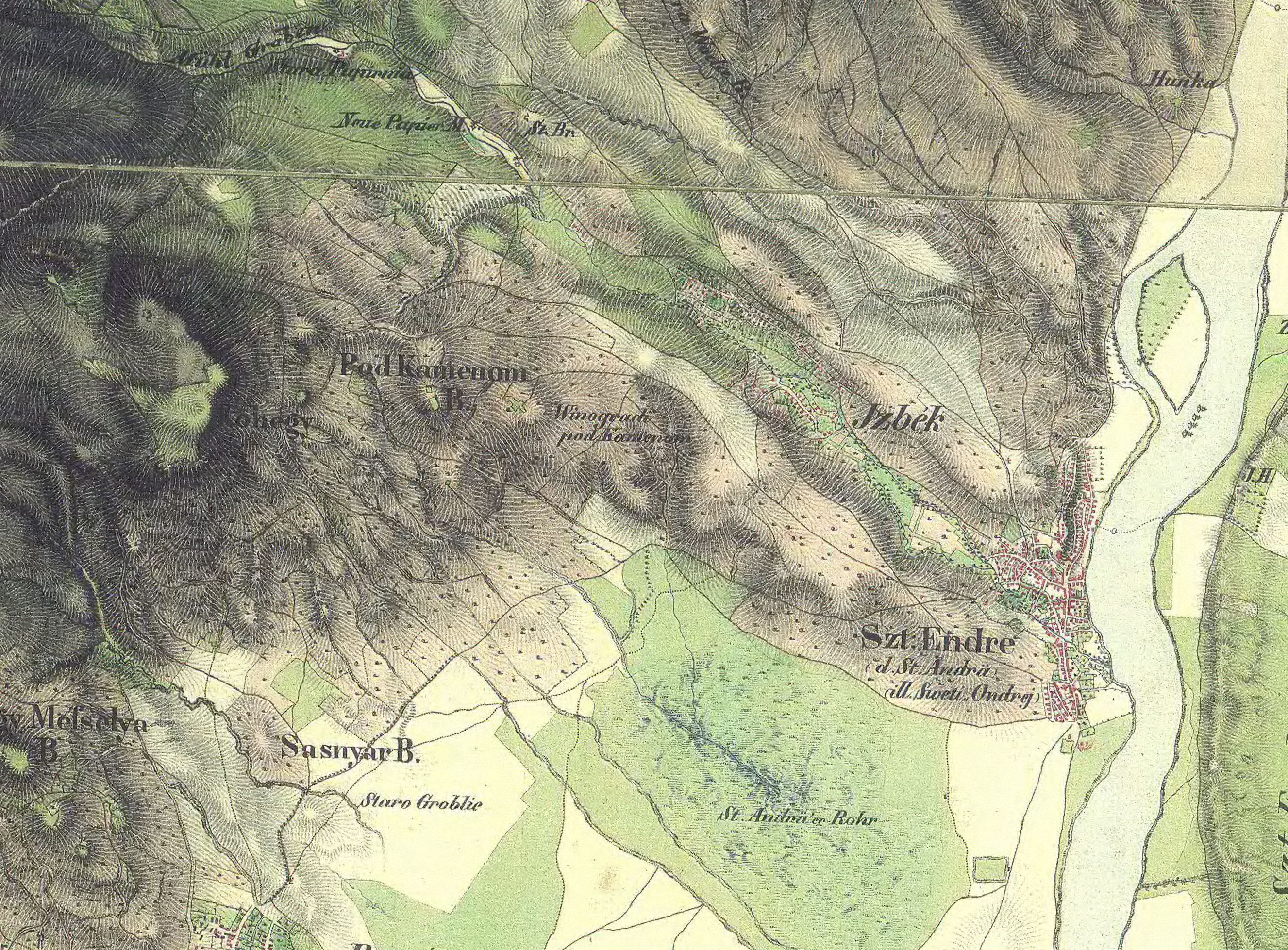 A második katonai felmérés egyik szelvénye, a térképen Szentendre és környéke látható